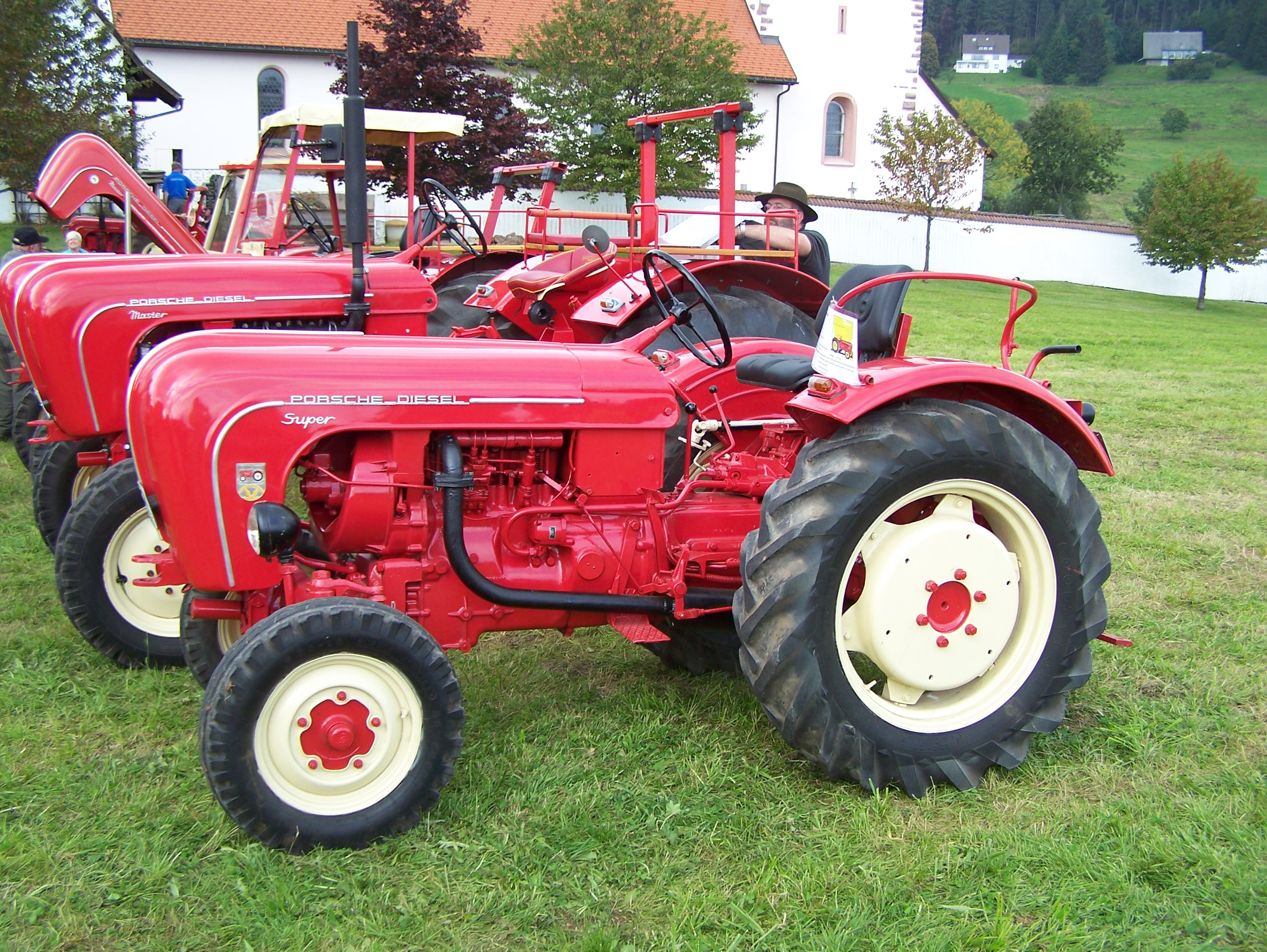 aufgenommen beim Porsche-Oldtimer-Treffen in Saig, Lenzkirch, Baden-Wüttemberg, Deutschland